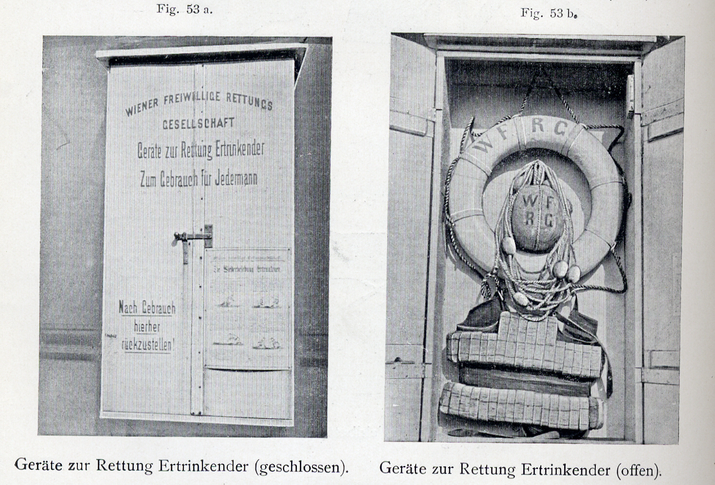 Figur 53: Geräte zur Rettung Ertrinkender